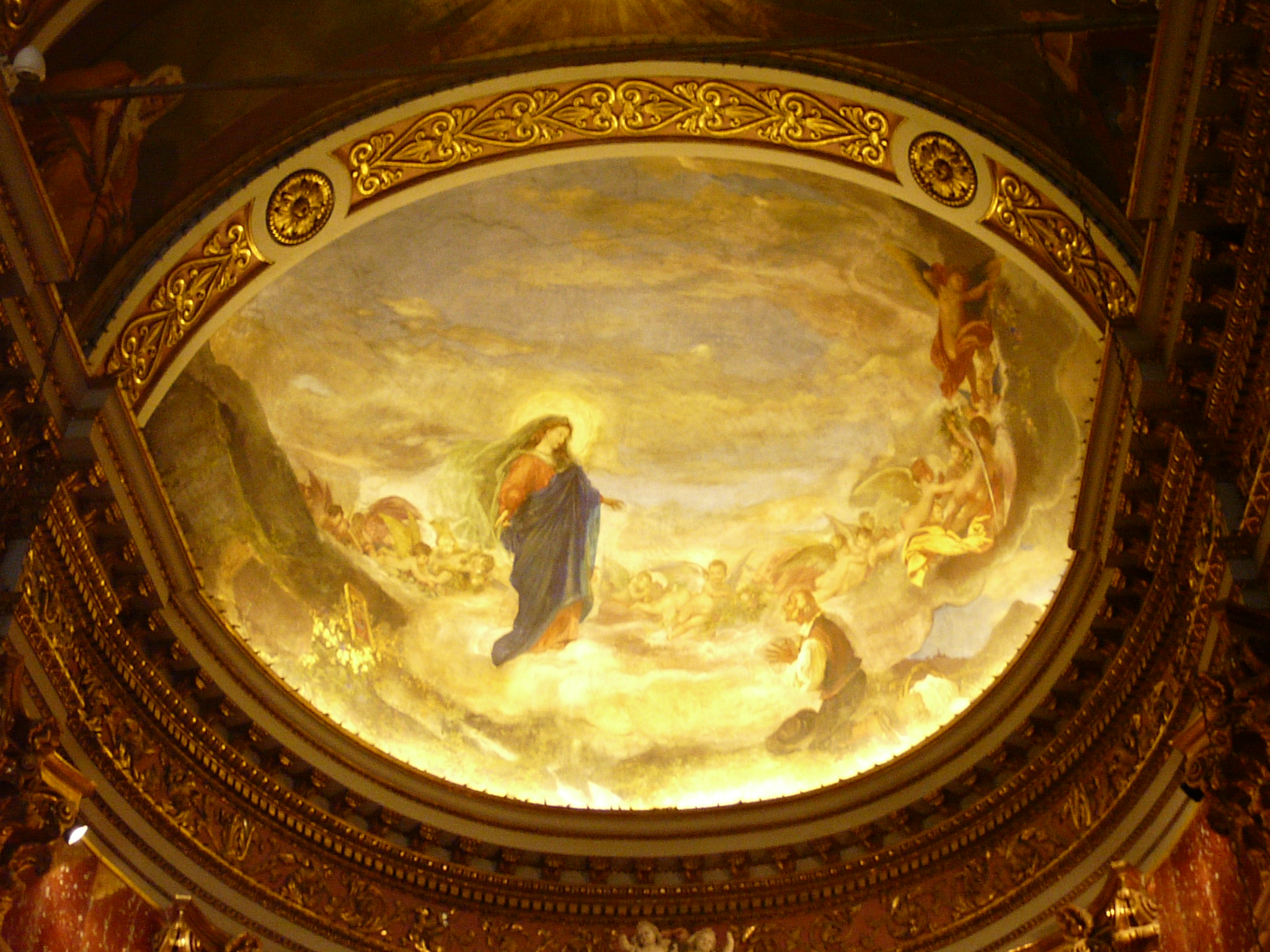 Affresco raffigurante l'Apparizione mariana del pittore Nicolò Barabino, Santuario di Nostra Signora di Montallegro, Rapallo, Liguria, Italia